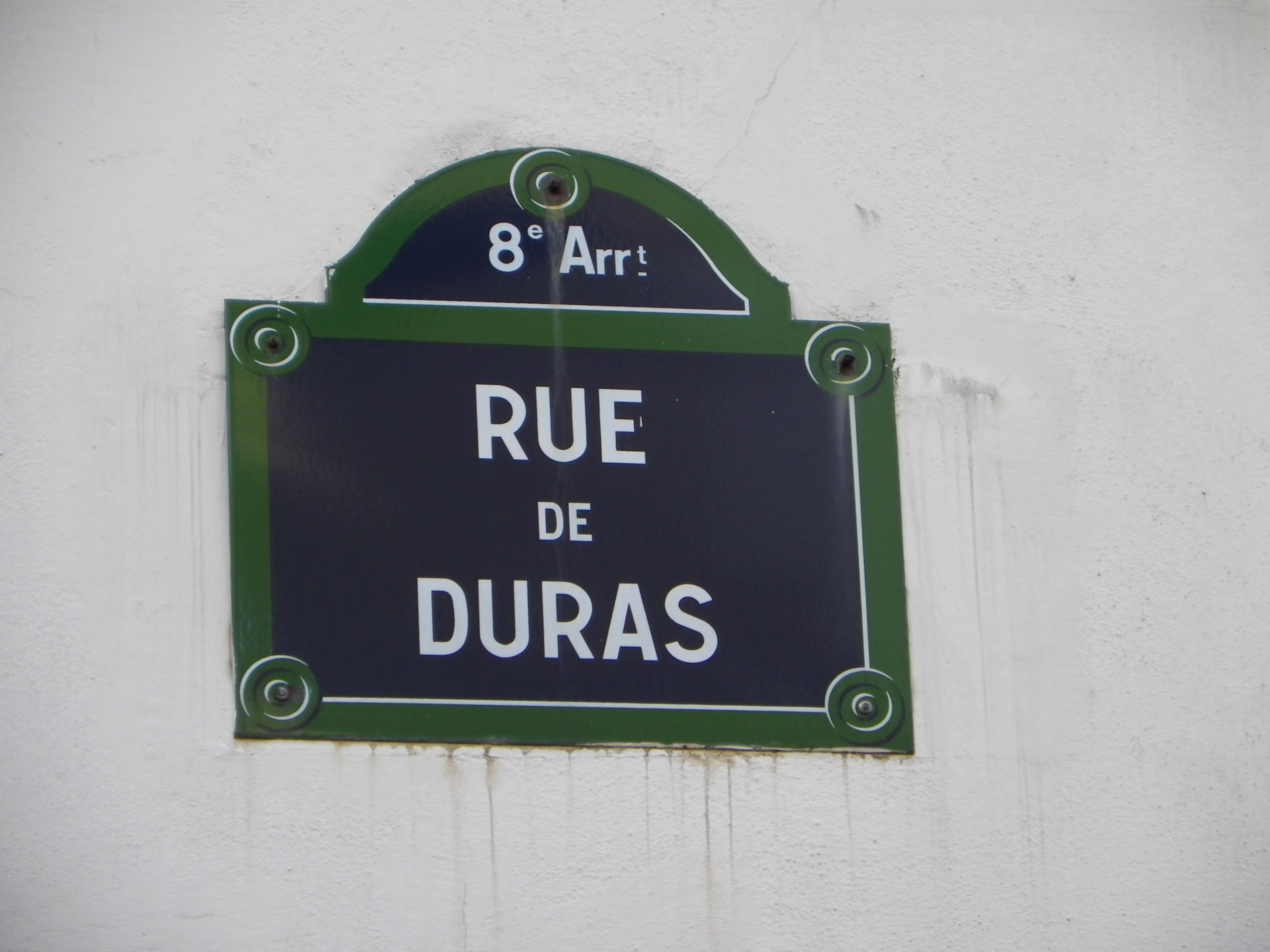 Plaque rue de Duras à Paris